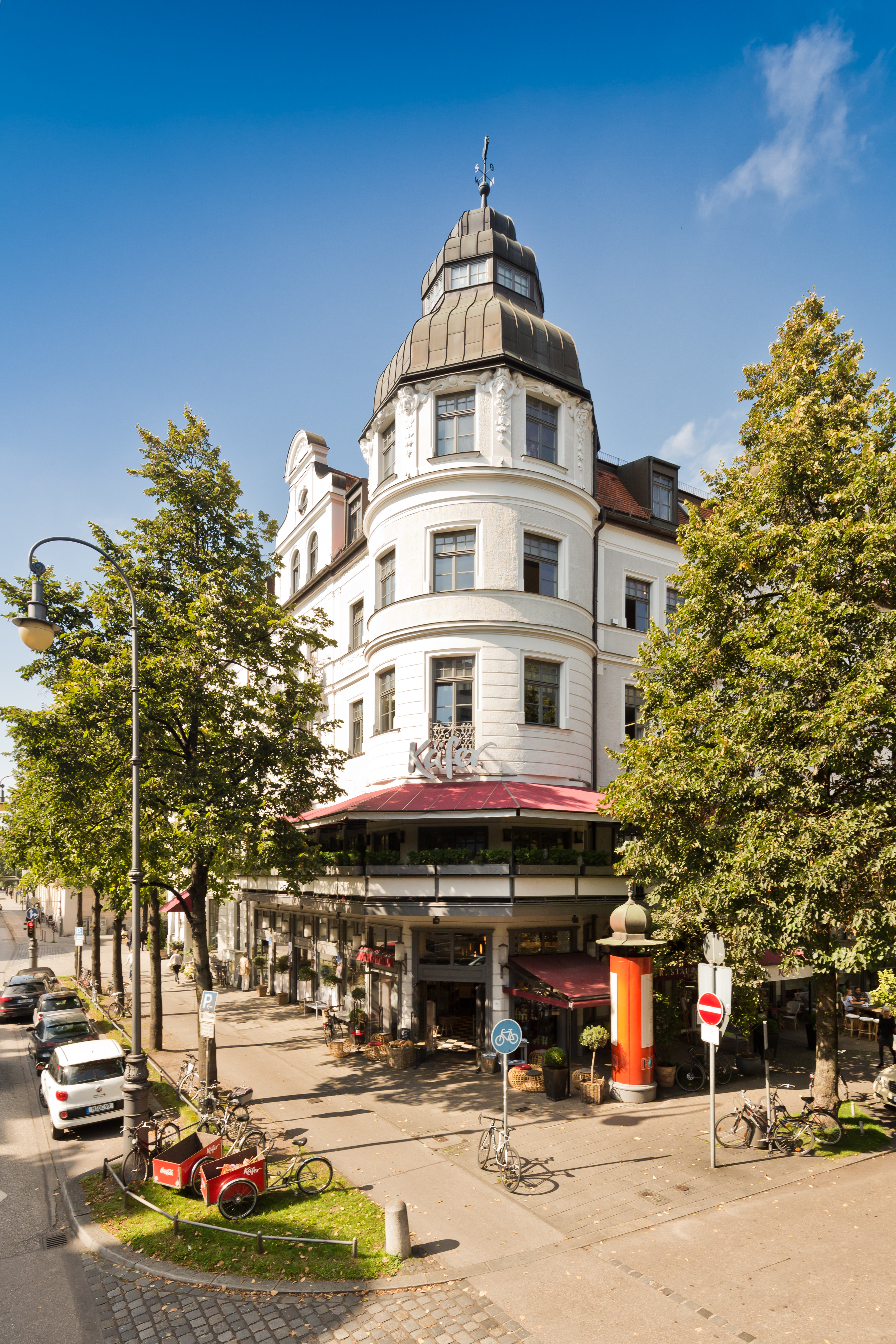 Foto: Thorsten Jochim